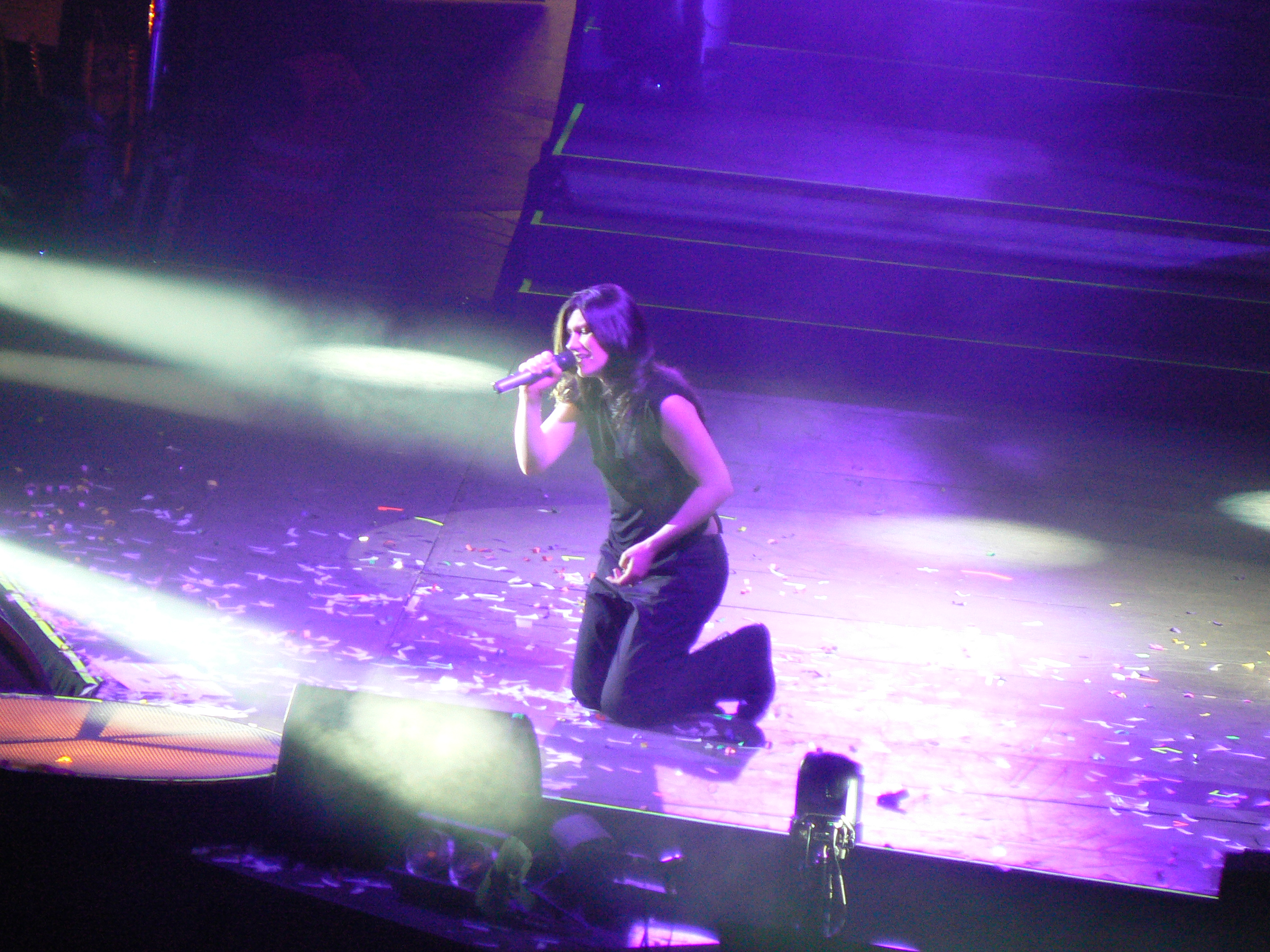 Elisa nella tappa al Forum di Assago del 14 maggio 2010 a Milano